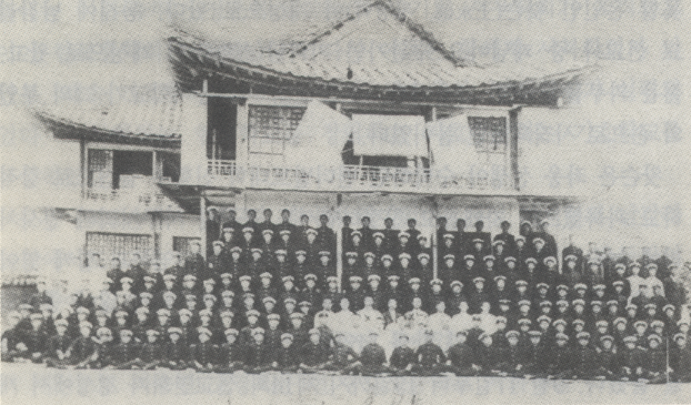 대성학교 졸업 앨범, 가운데 중앙의 x표 친 이가 윤치호